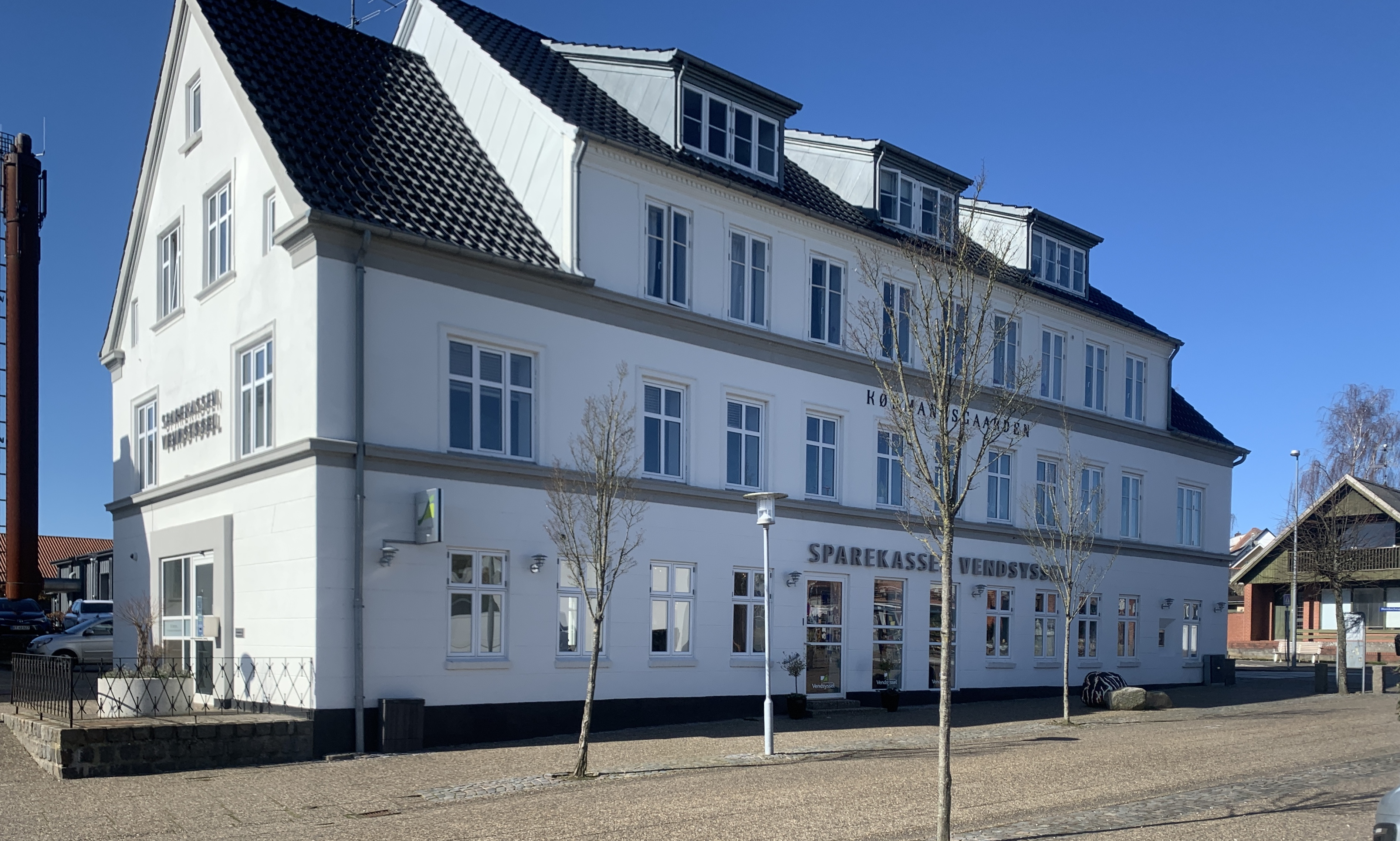 Købmandsgården på Storegade i Hadsund.